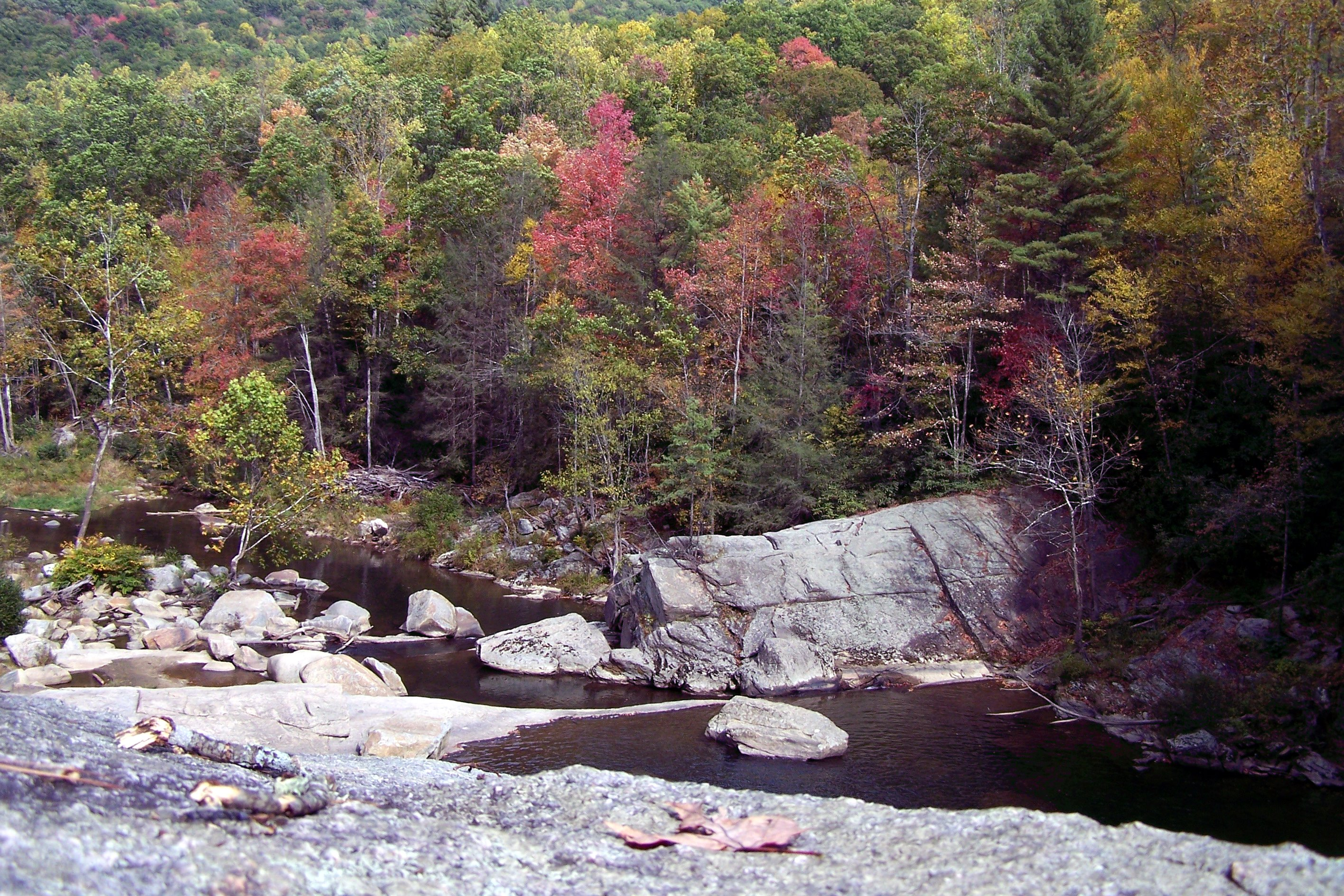 Elk River